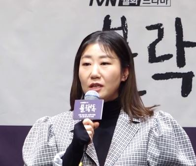 tvN 새 월화드라마 '블랙독' 제작발표회가 11일 오후 서울시 구로구 신도림 라마다호텔에서 열렸다.